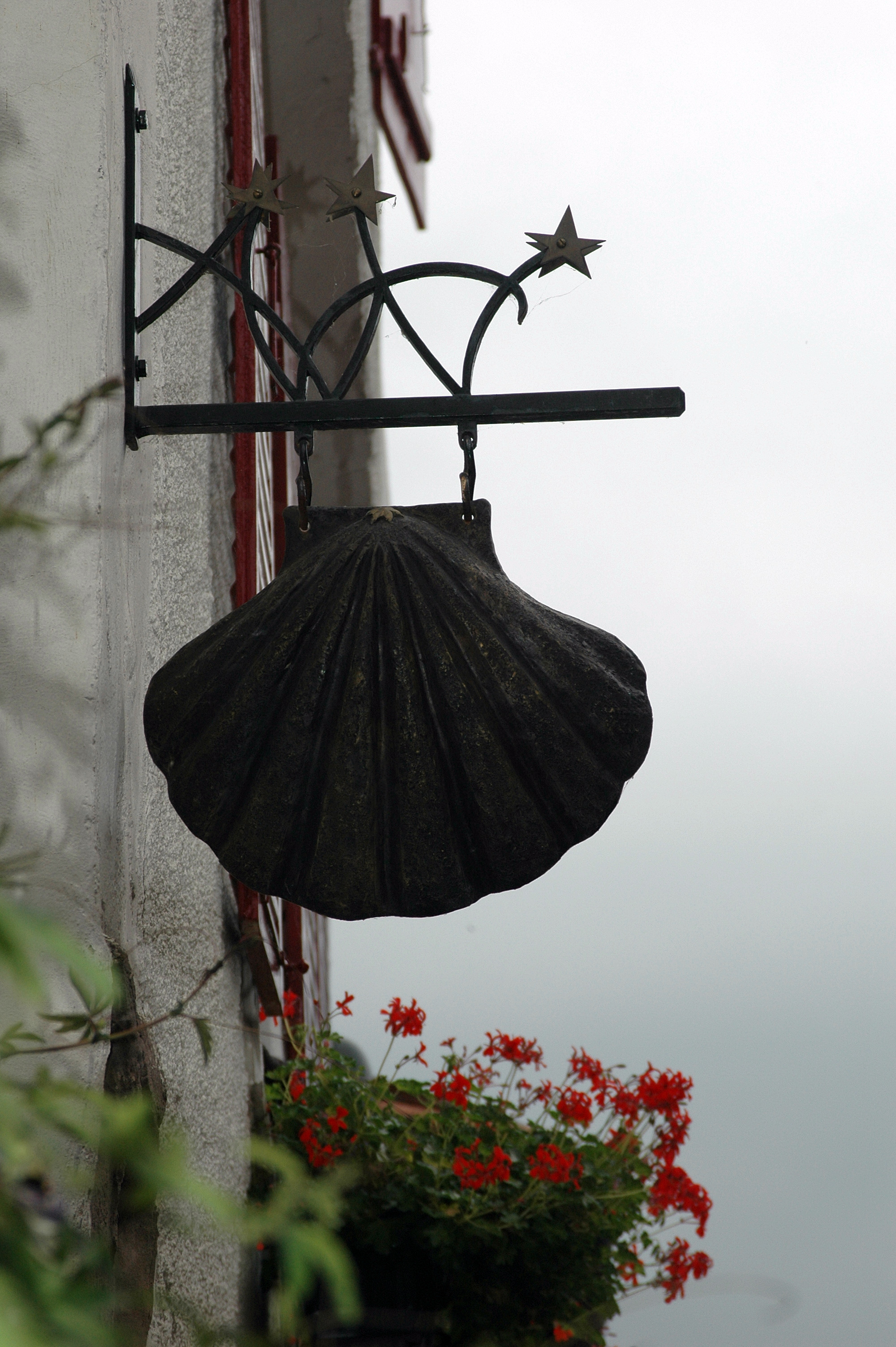 Saint-Jean-Pied-de-Port, enseigne sur le chemin de Saint-Jacques de Compostelle. Photo prise le 13/07/06 par Harrieta171